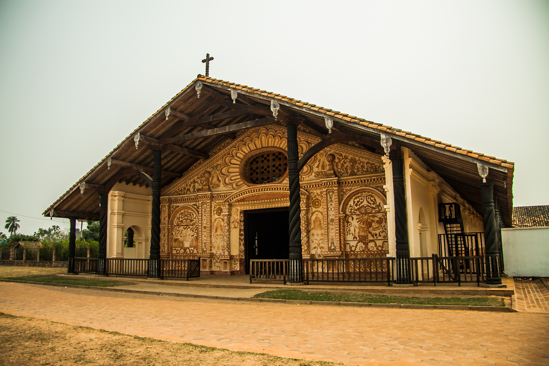 Templo de San Rafael This medium shows the protected monument with the number S/00-041 in Bolivia.